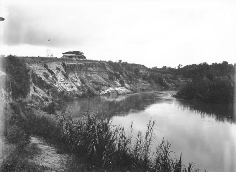 Der Wami-Fluß bei Kissanke